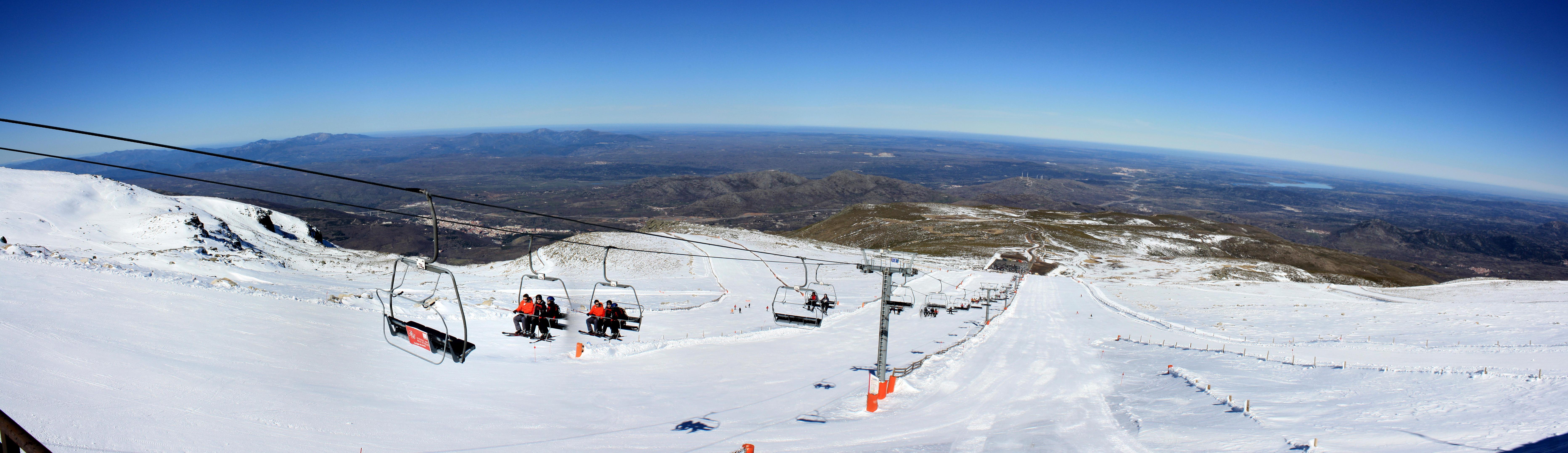 Panorámica desde el mirador de la estación de esquí Sierra de Bejar, La Covatilla